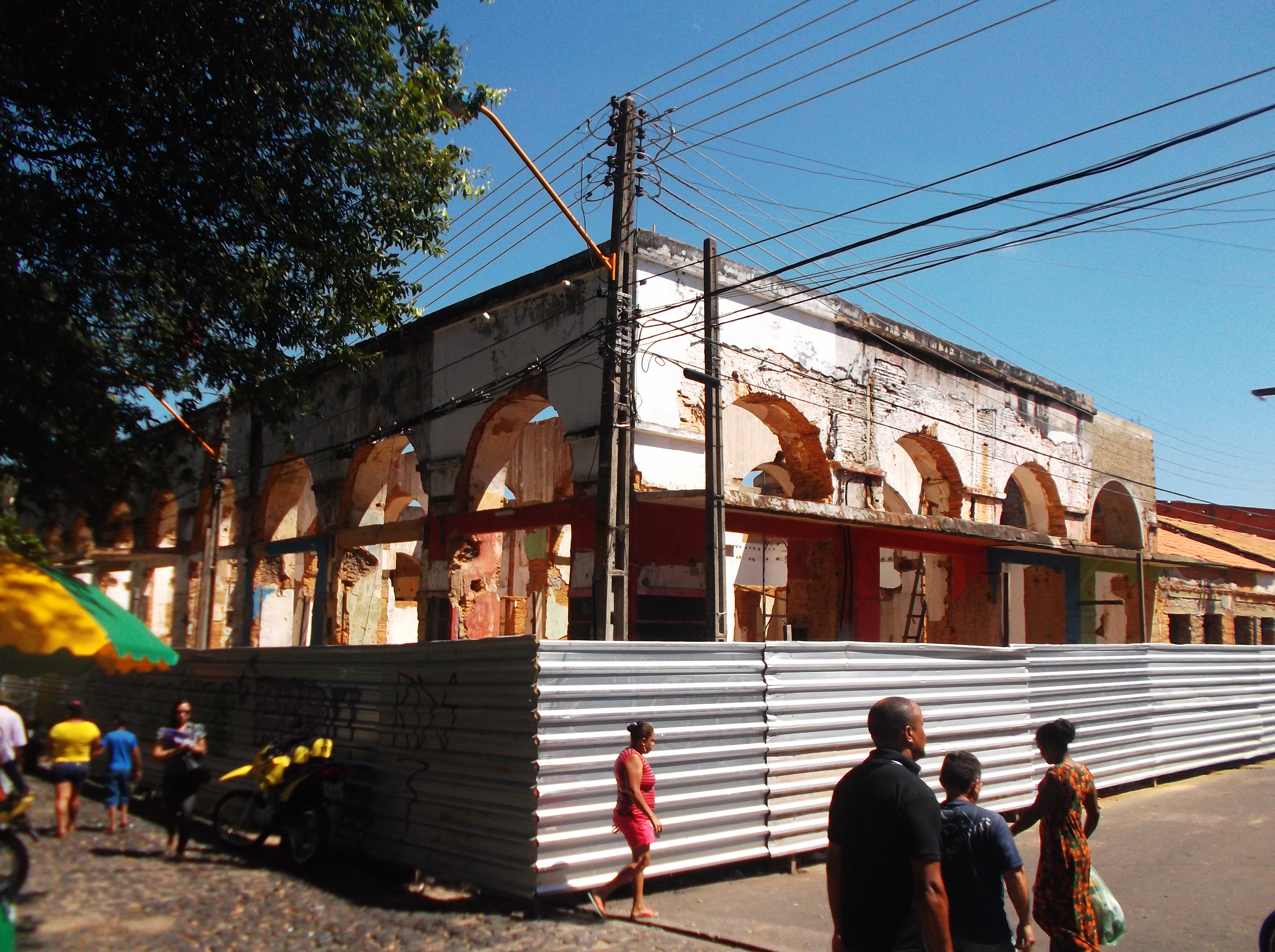 Restauração do Mercado Municipal São José, em Teresina, no Piauí.